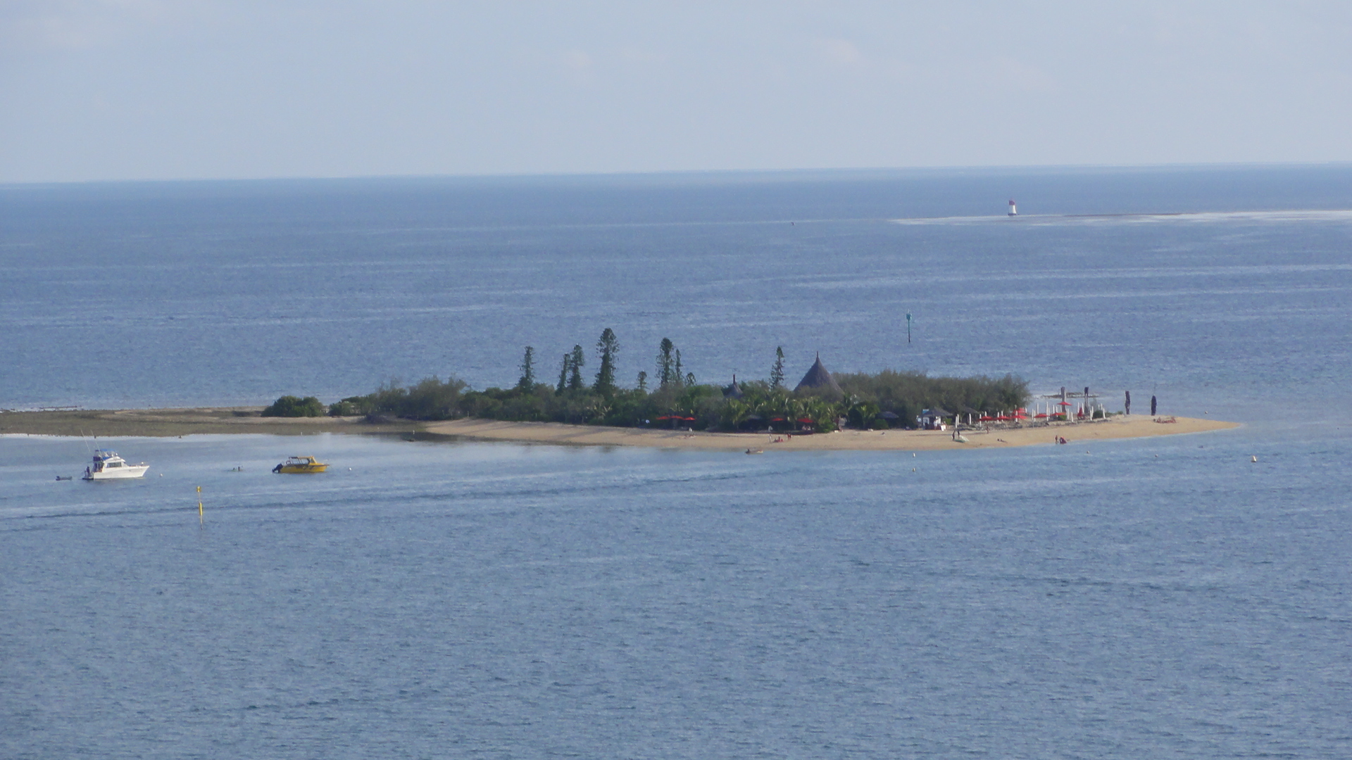 Ilot Canard à Nouméa